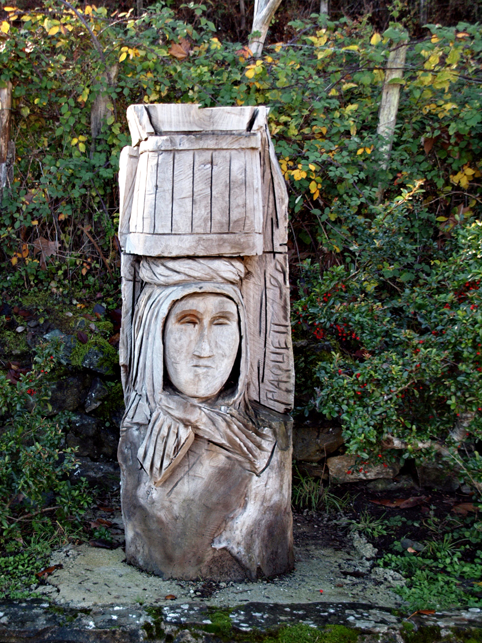 Vezzani (Corse) - La Porteuse d'eau, tronc d'arbre sculpté exposé dans le village